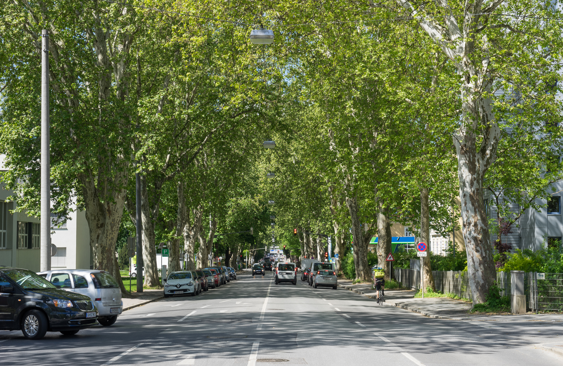 Platanen Allee entlang der Elisabethstraße This media shows the Geschützter Landschaftsteil in Styria with the ID GLT_1296.